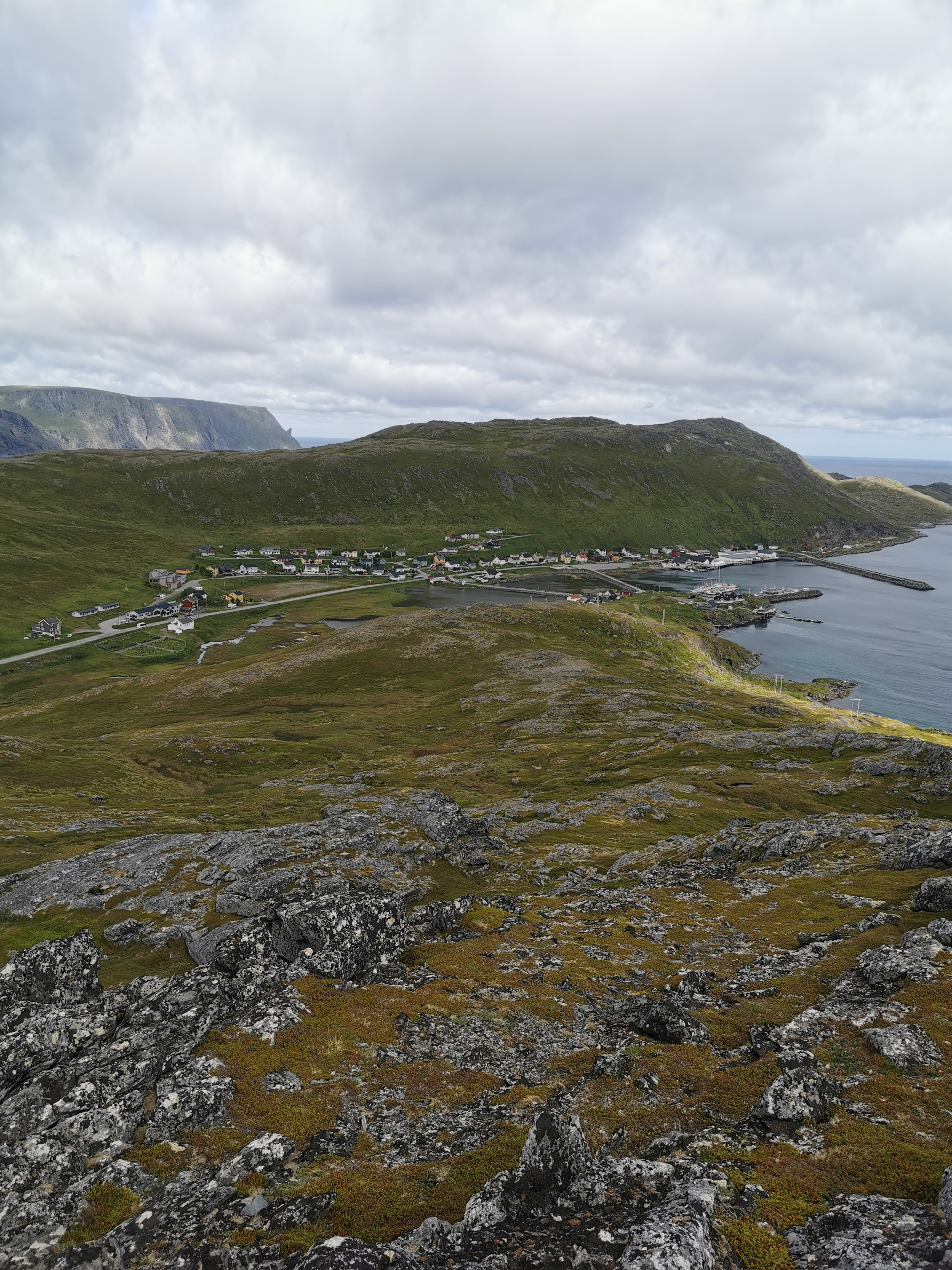 Das Dorf Skarsvag von oben. Im Jahre 2019